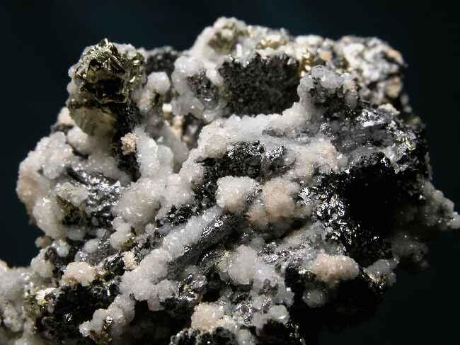 chalkopiryt, galena, kalcyt, pochodzenie Rumunia; autor zdjecia Piotr Menducki